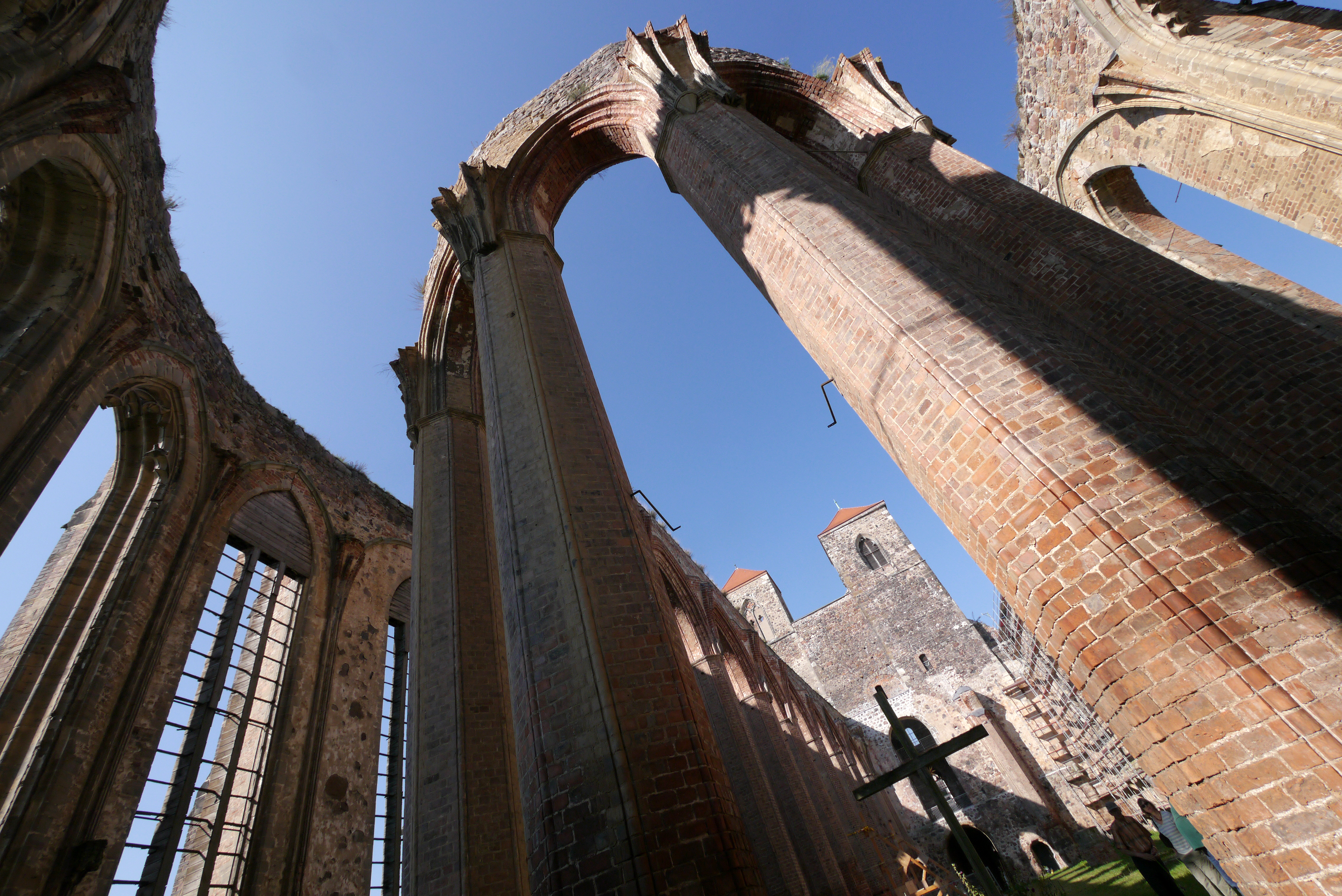 Kirchenruine St. Nikolai Zerbst / Sachsen-Anhalt. Säulen des Innenraumes.